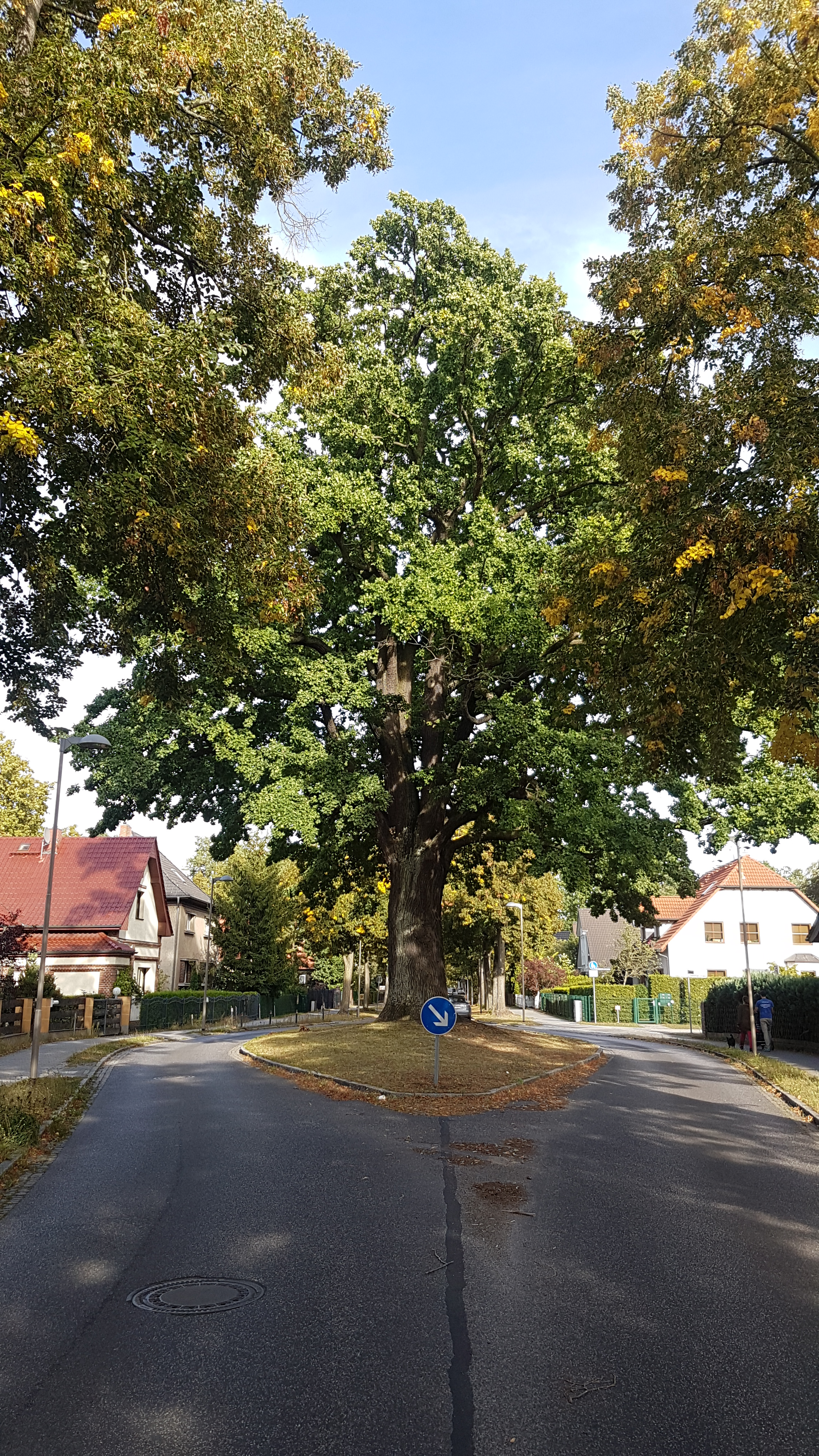 Eichwalder Friedenseiche, Naturdenkmal in Eichwalde